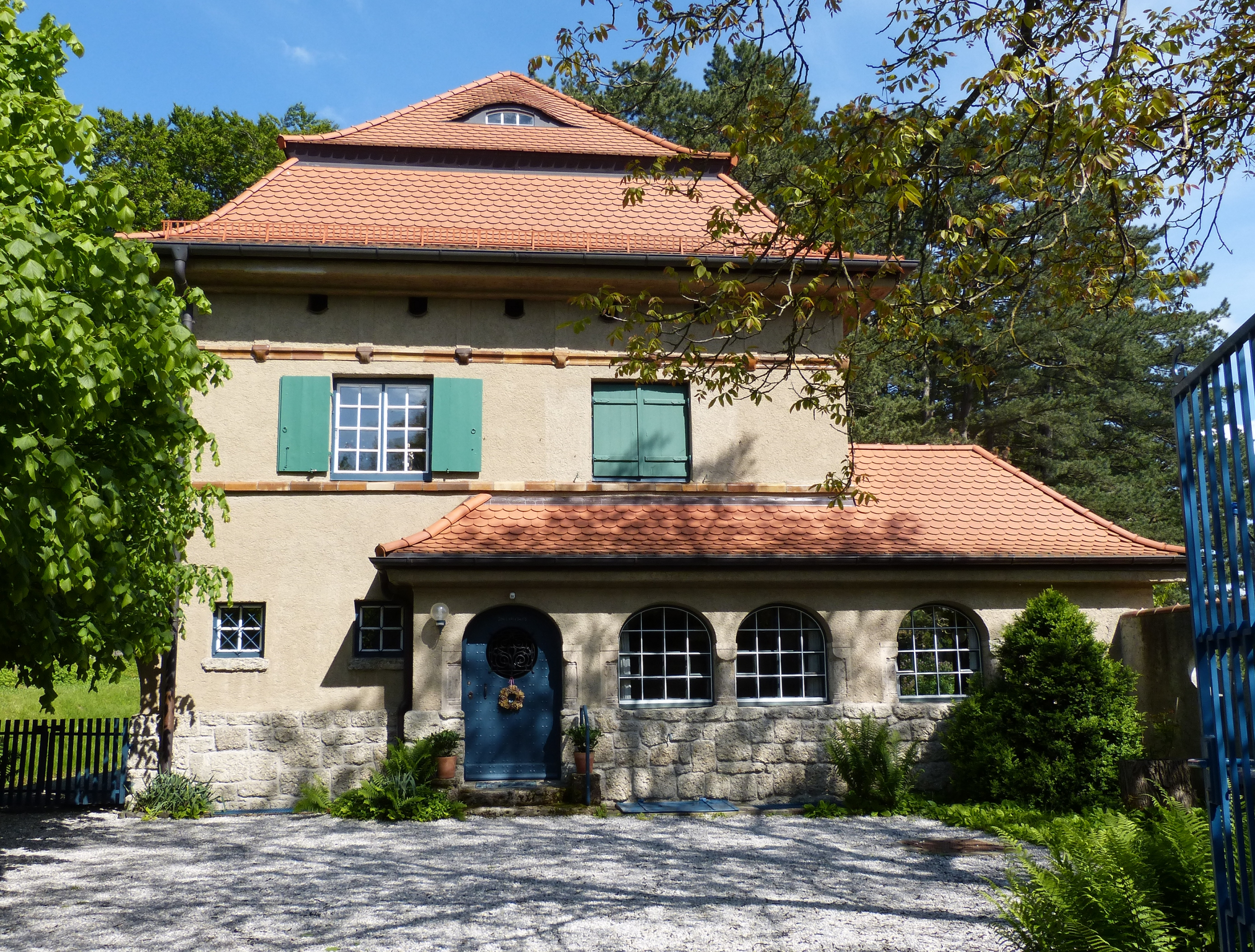 Feldafing, Höhenbergstraße 35, Villa Carl. Der zweigeschossige Mansarddachbau im geometrisierenden Jugendstil mit Schweifgiebel-Zwerchhaus und Klinkerziegel-Gliederungen entstand 1910/11 unter der Leitung von Richard Riemerschmid.